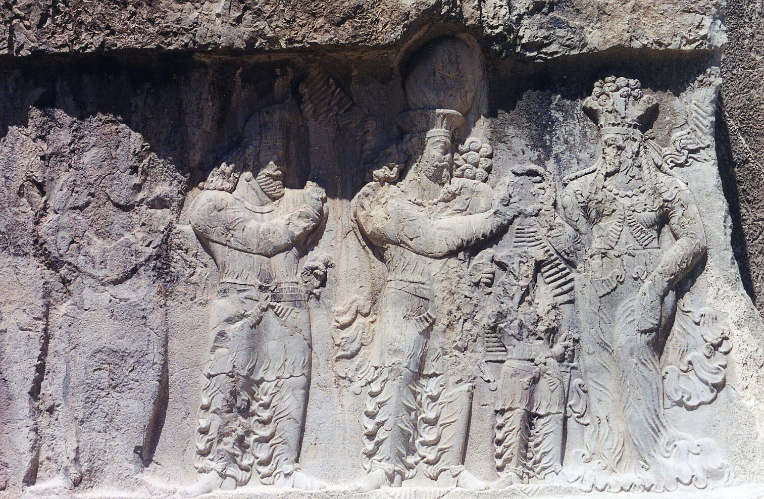 Naqsh-i Rustam (Iran). Bas-relief ruspestre représentant l'investiture du roi Narsès par la déesse Anahita. Fin du IIIe siècle. Photo Ginolerhino 2002.